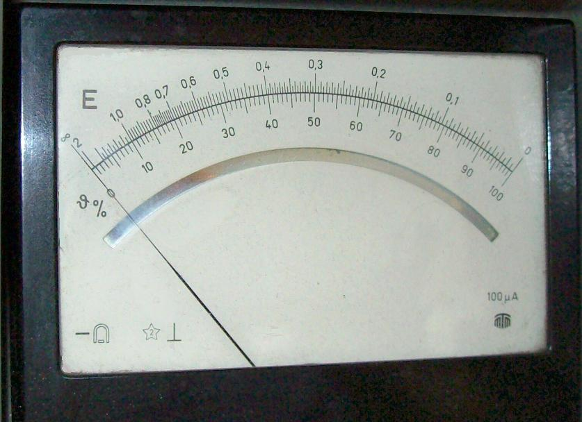 Spiegelskala